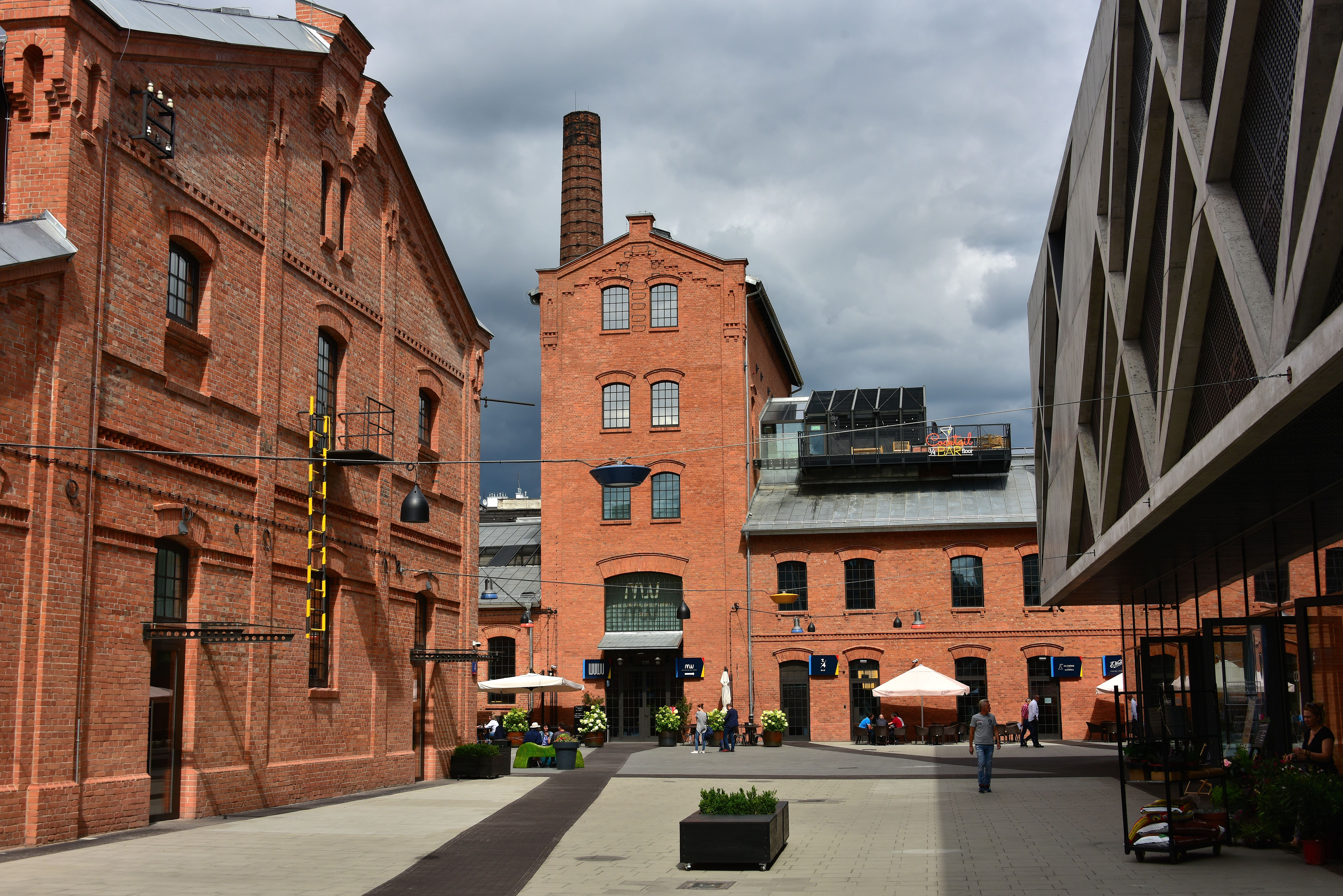 Centrum Praskie Koneser w Warszawie